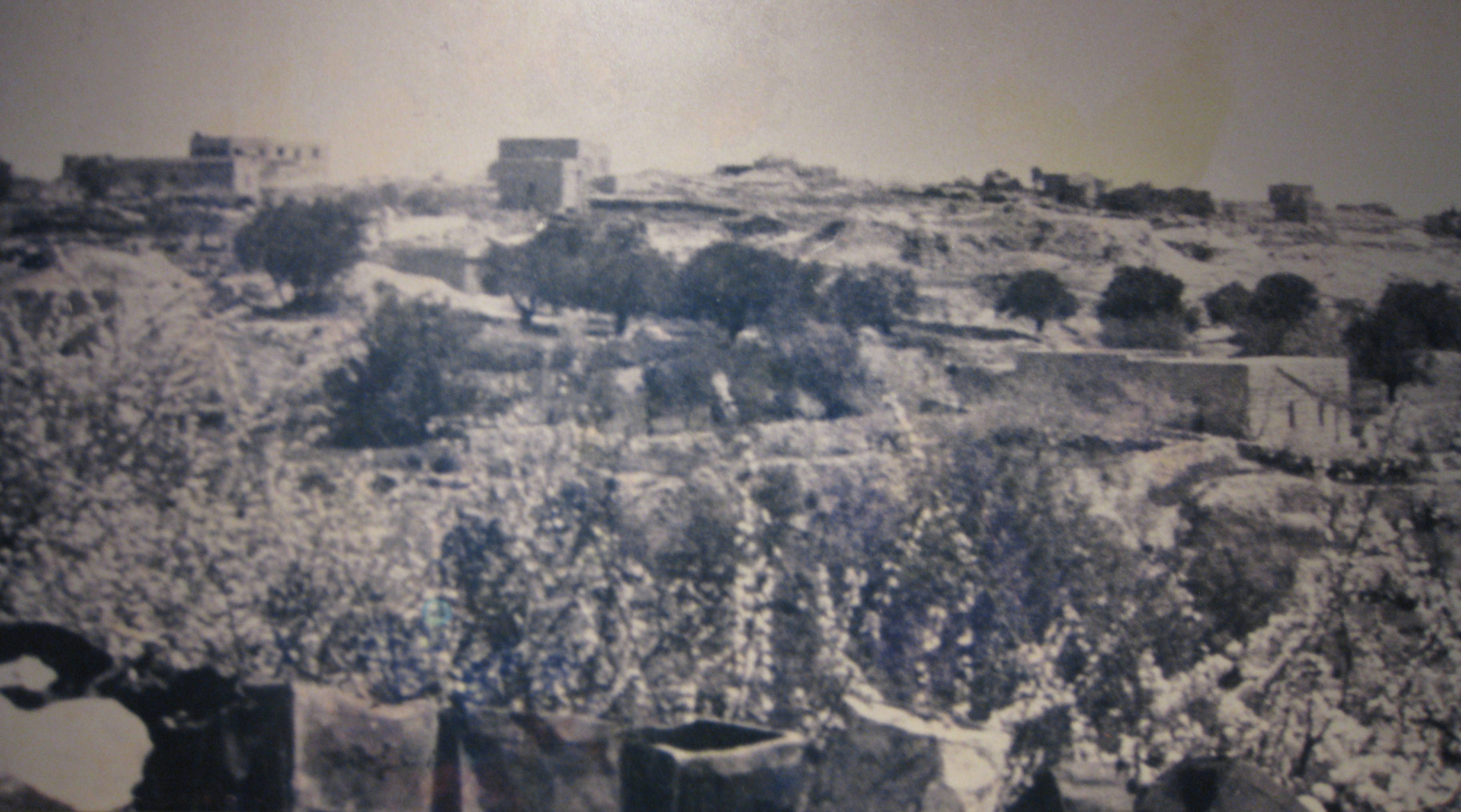 Beit Gidi Exhibits מוצגים בבית גידי - מוזיאון האצל בתש"ח